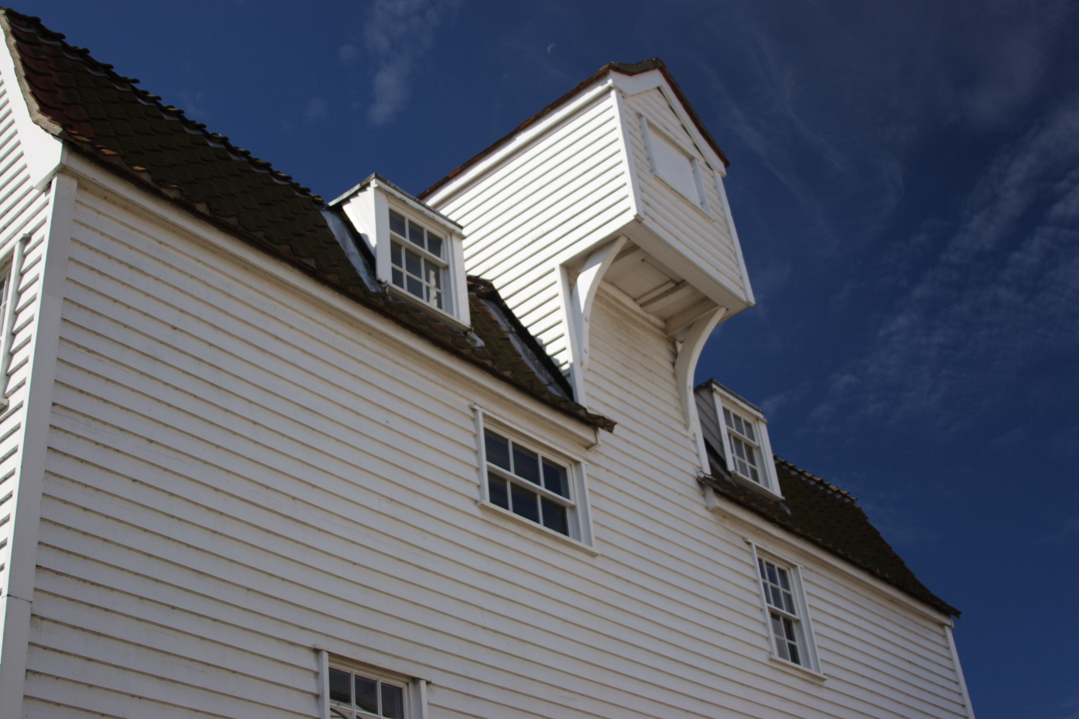 Woodbridge Tide Mill